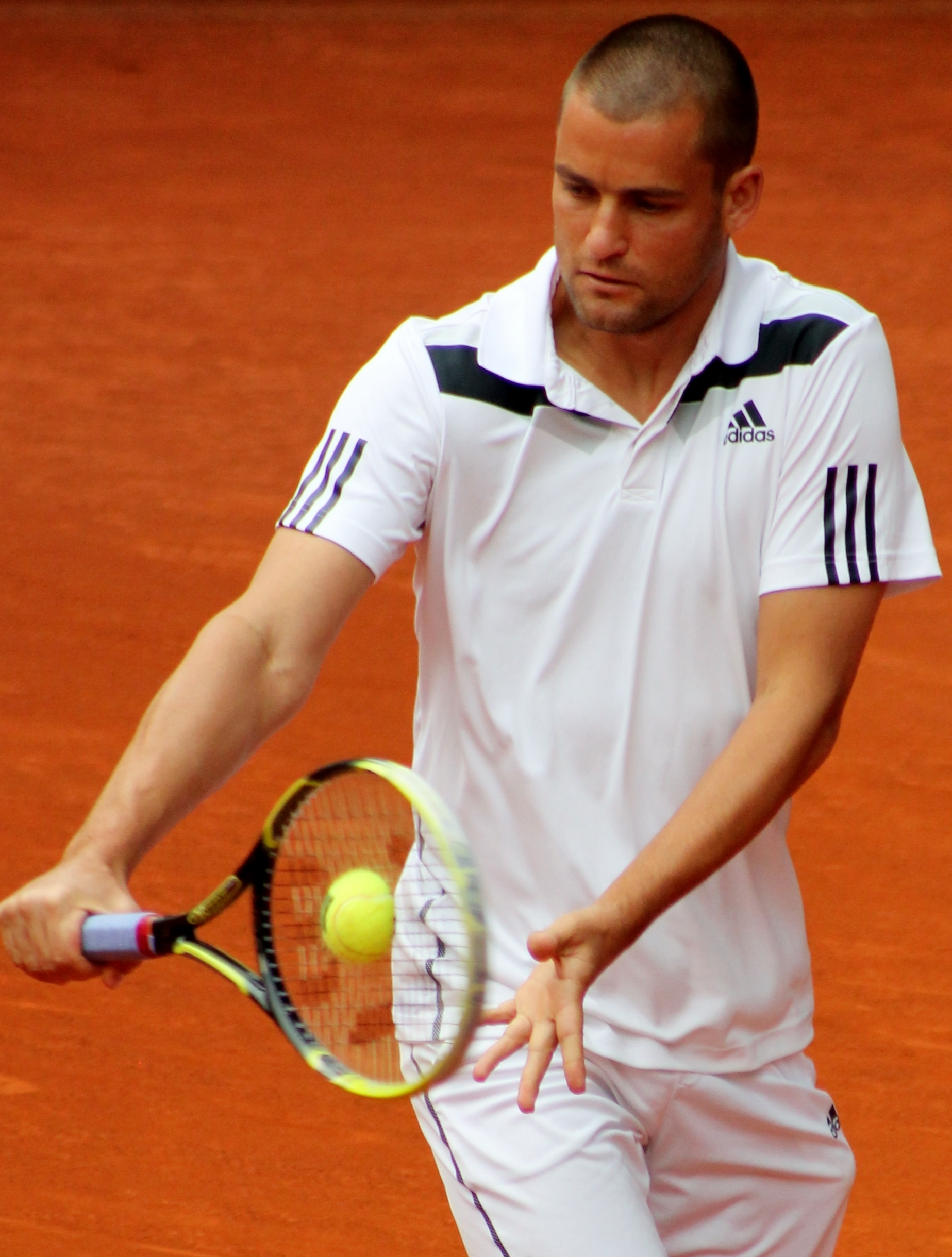 Youzhny MA14 (8)